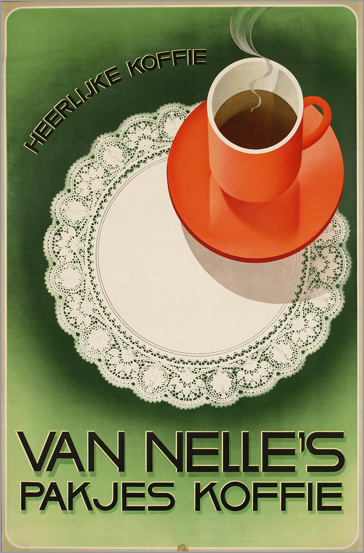 Affiche: Van Nelle's pakjes koffie. Heerlijke koffie.